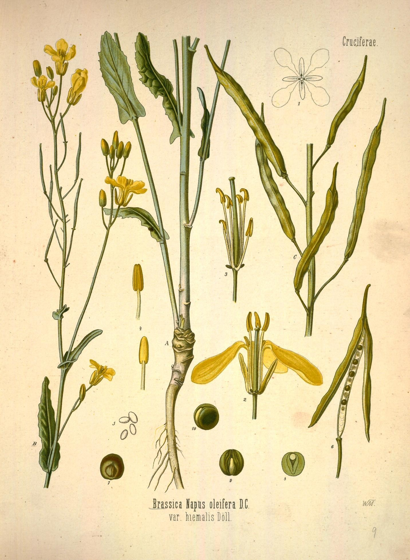 Raps. A B Pflanze in natürl. Grösse; C Theil der Fruchttraube, desgl.; 1 Blüthe, schematisch, vergrössert; 2 dieselbe von der Seite, stärker vergrössert; 3 innere Blüthe, desgl.; 4 Staubgefässe, desgl.; 5 Pollenkörner, desgl.; 6 aufgesprungene Frucht, nat. Grösse; 7 Same, vergrössert; 8, 9, 10 derselbe ohne Samenschale, desgl.